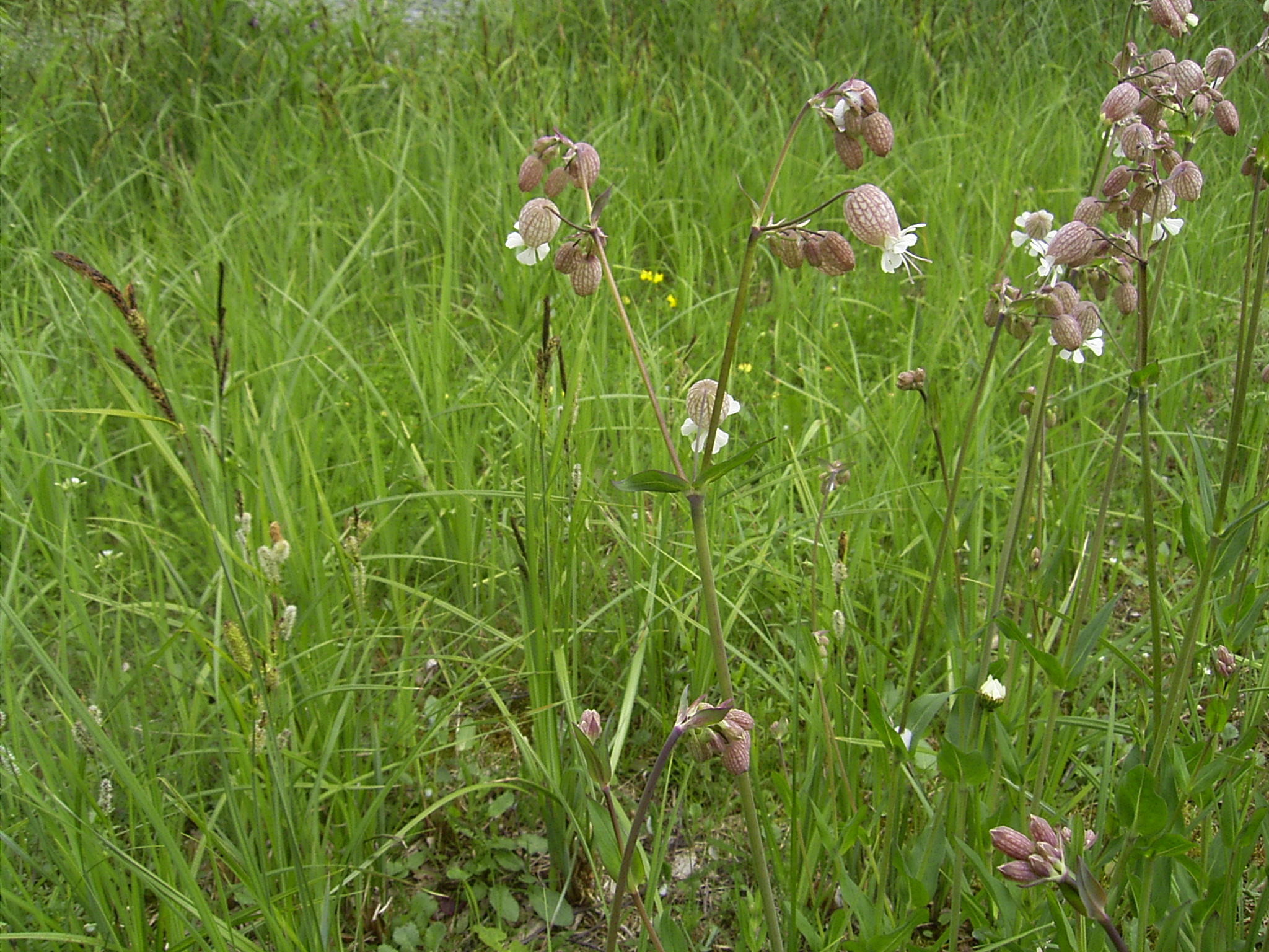 Silene vulgaris. Genomen in Gouda, bedrijventerrein Goudse Poort, 14 mei 2004